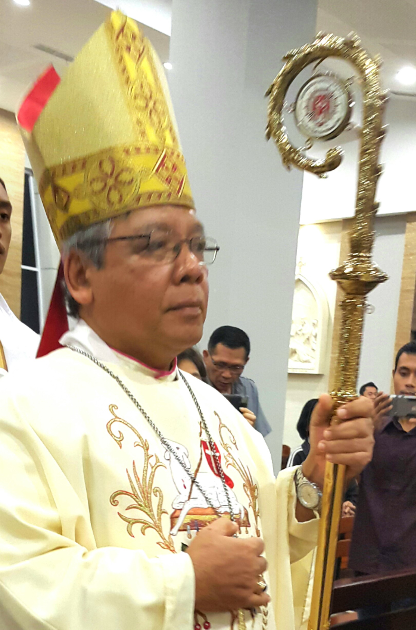 Mgr Yustinus Hardjosusanto, Uskup Agung Samarinda